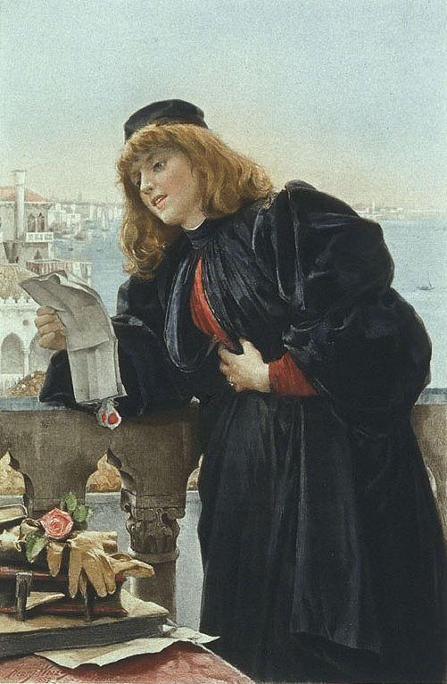 Portia